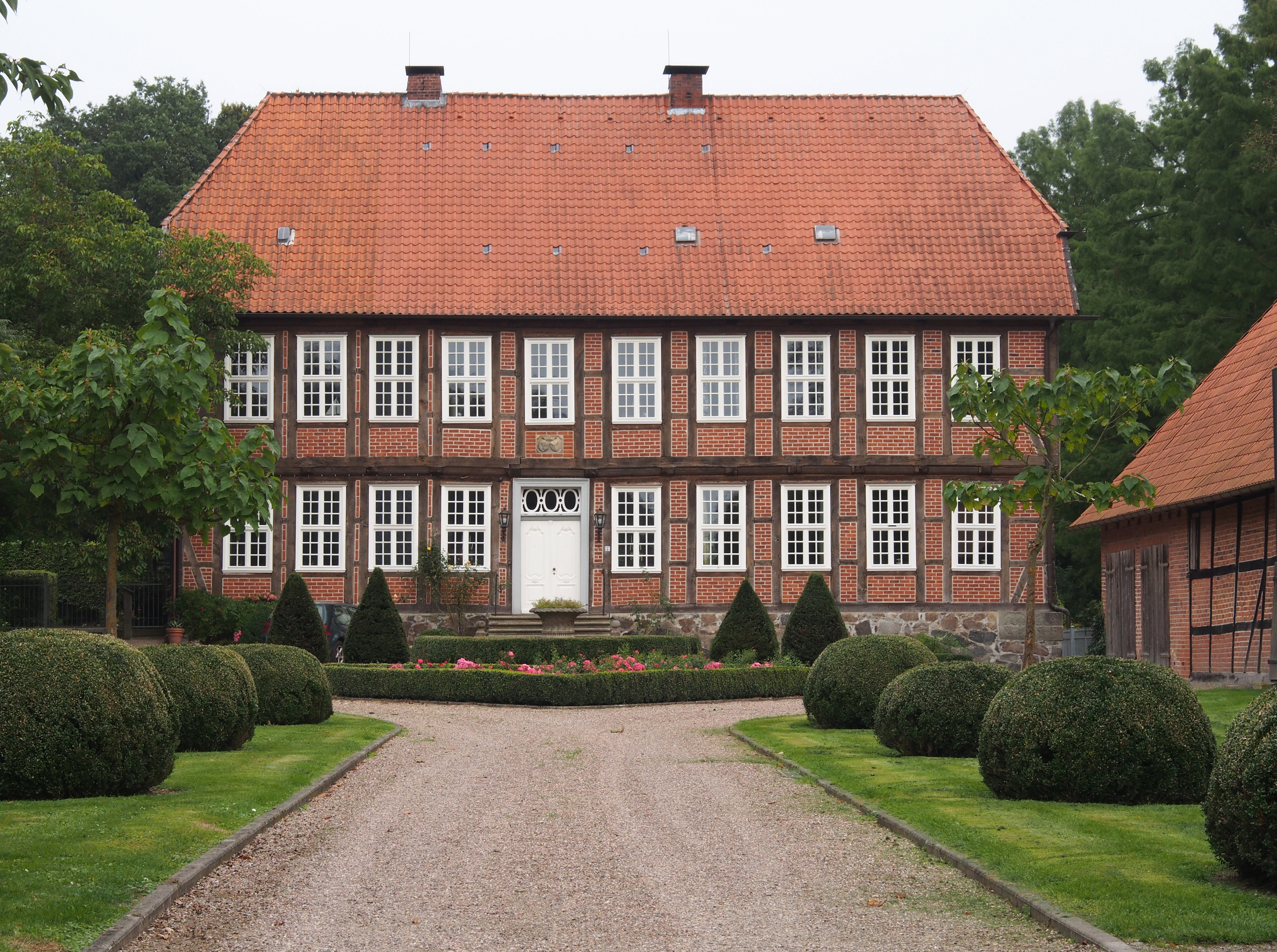 Nordgut in Eldingen Ortsteil Hohnhorst, Niedersachsen (Germany)